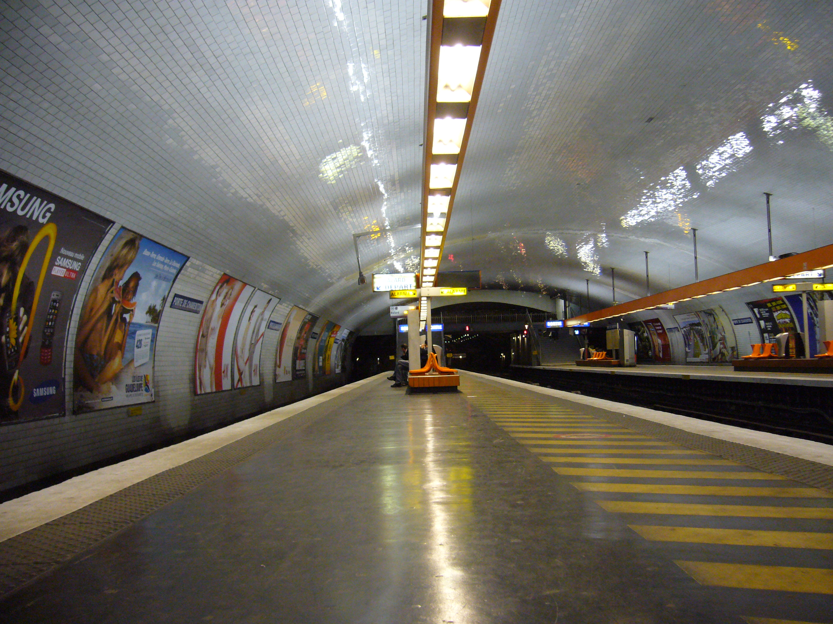 Pařížské metro - linka 8 - stanice Porte de Charenton